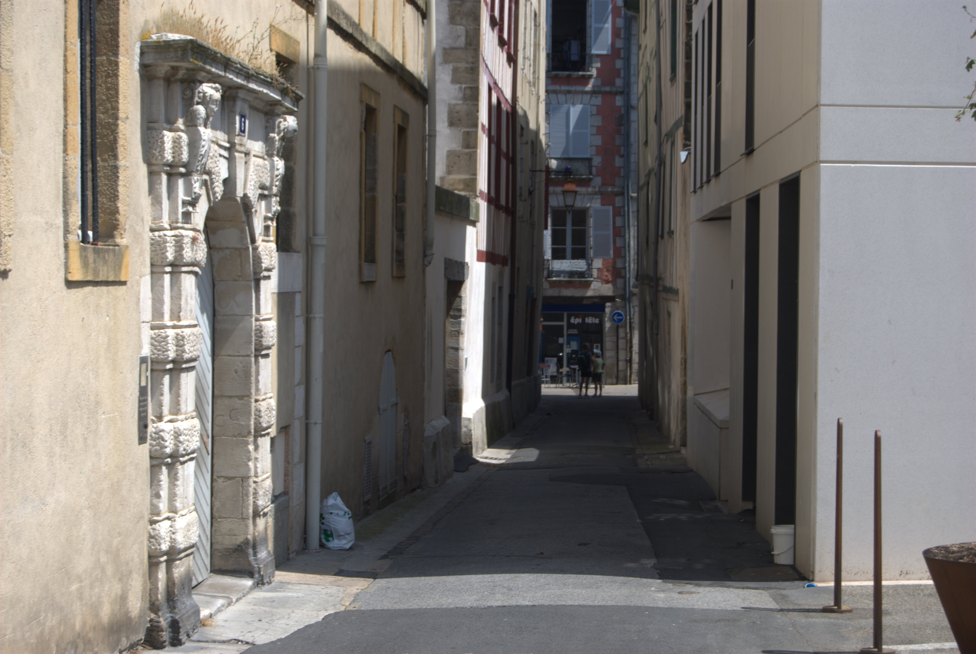 La rue Sabaterie depuis la rue Montaut vers la rue d'Espagne.